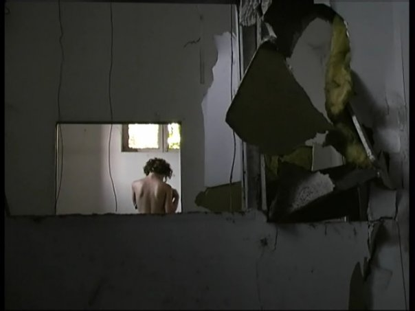 הוידאודאנס שיר "שיר אהבה" של עמנואלה עמיחי